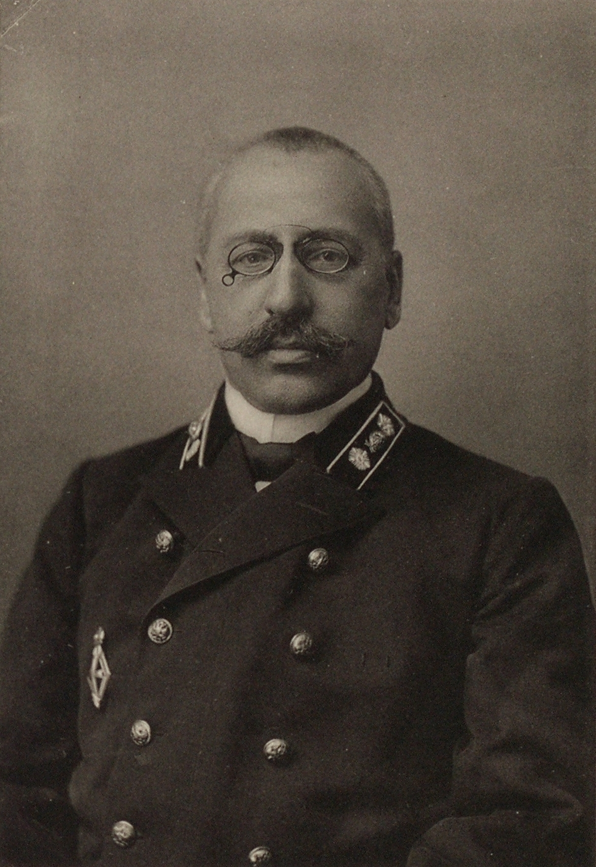 Николай Мартинианович Цытович, русский экономист и статистик, ректор Киевского университета в 1905—1917 годах.